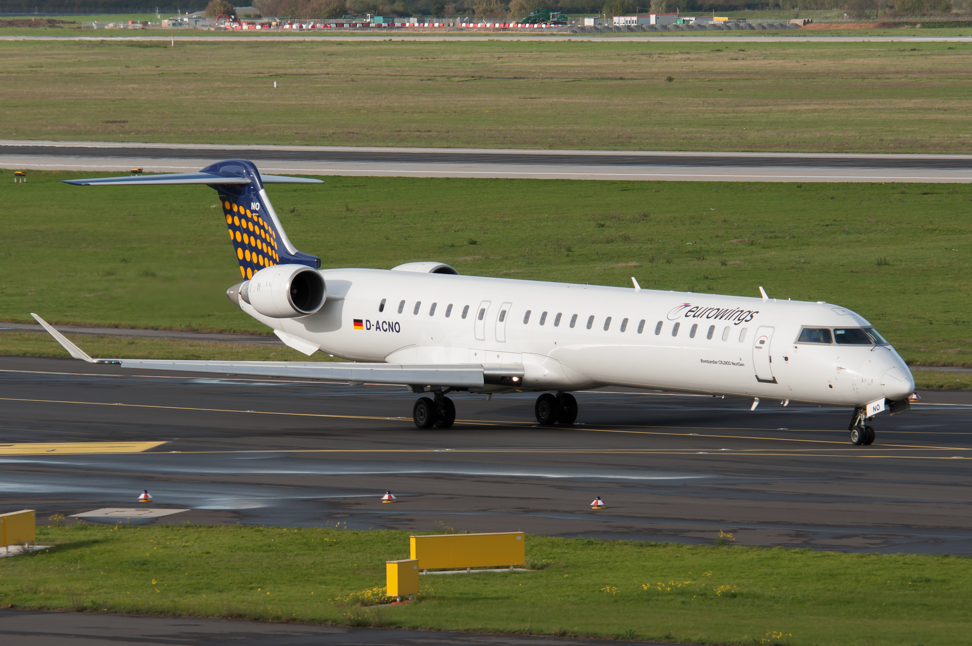 D-ACNO